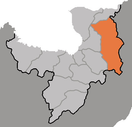 Map of Paegam, Ryanggang-do, DPRK, 2006